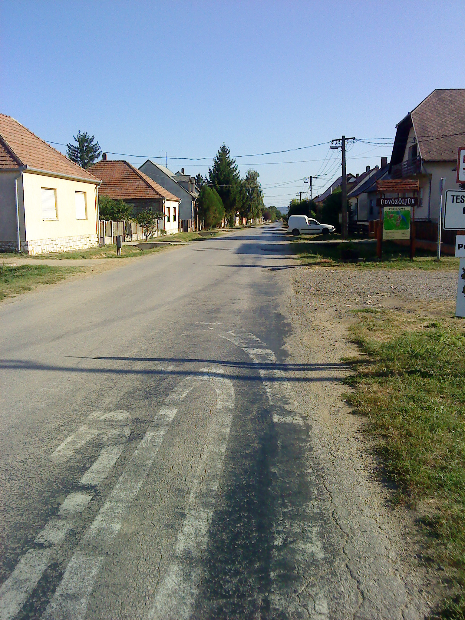 Pogány, Pécsi út